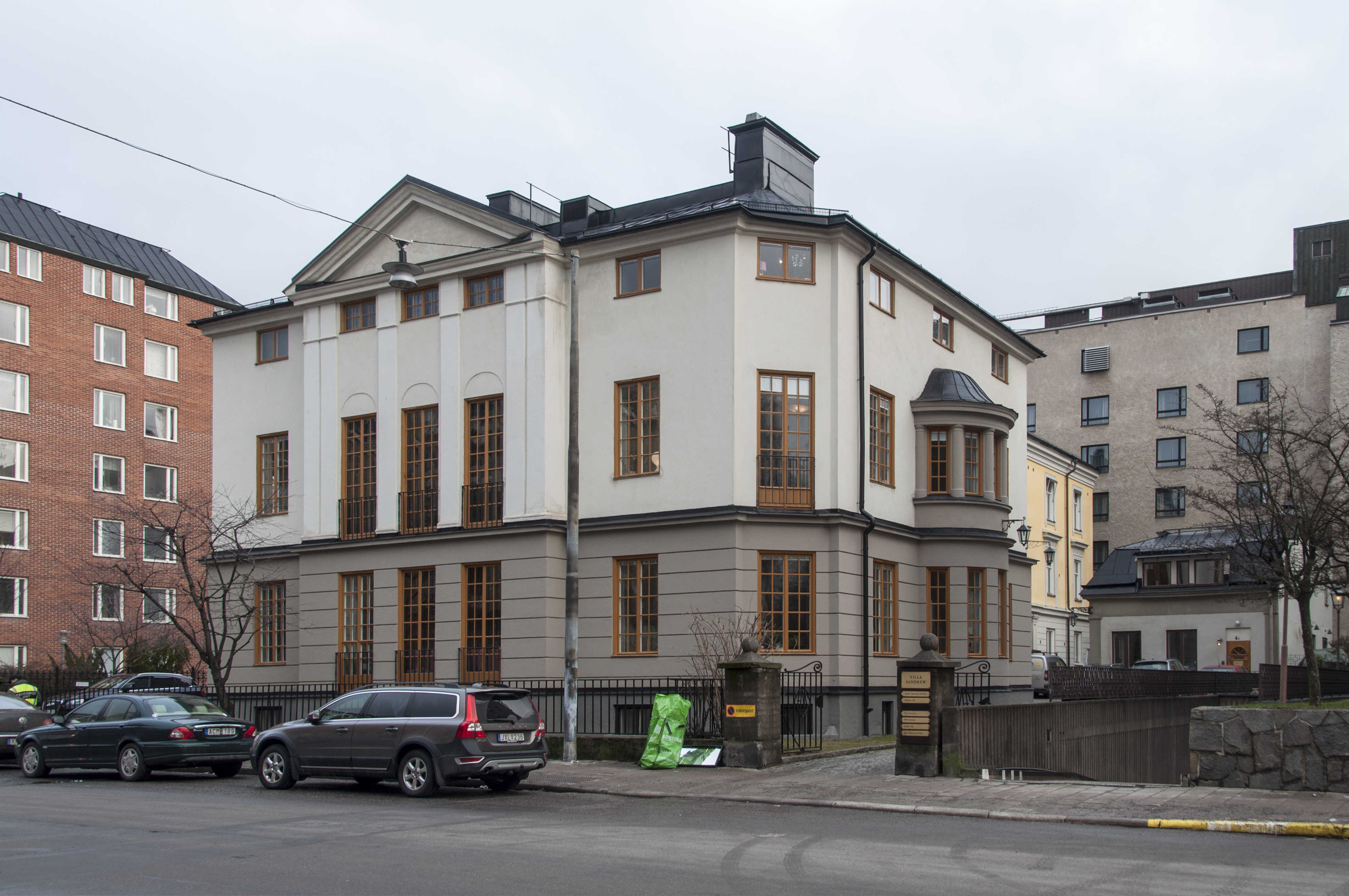 F.d. Raschska villan i Lönnen 7